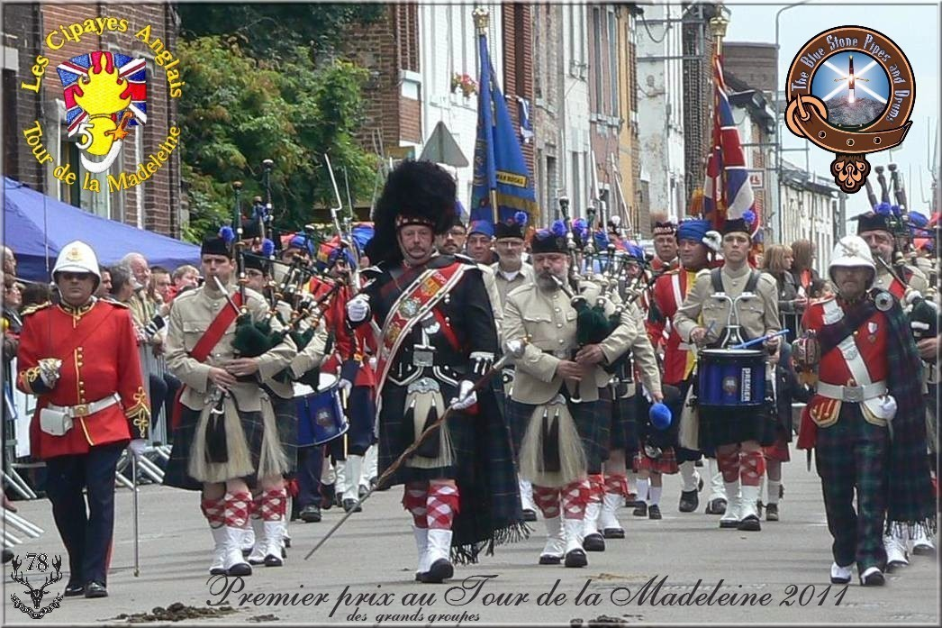 The Blue Stone Pipes and Drums au tour de la Madeleine de Jumet 2011